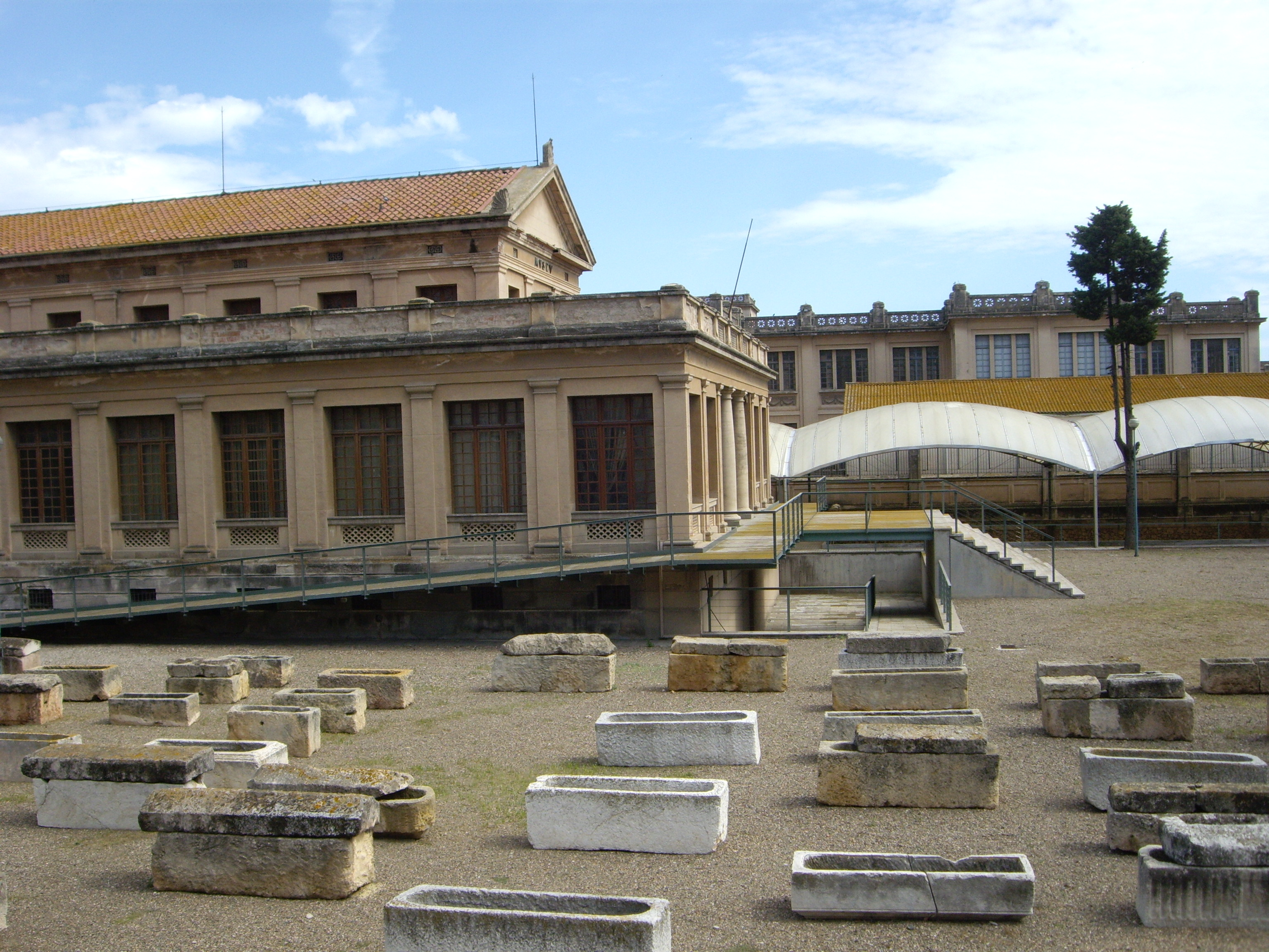 Necròpolis paleocristia a de Tarragona.